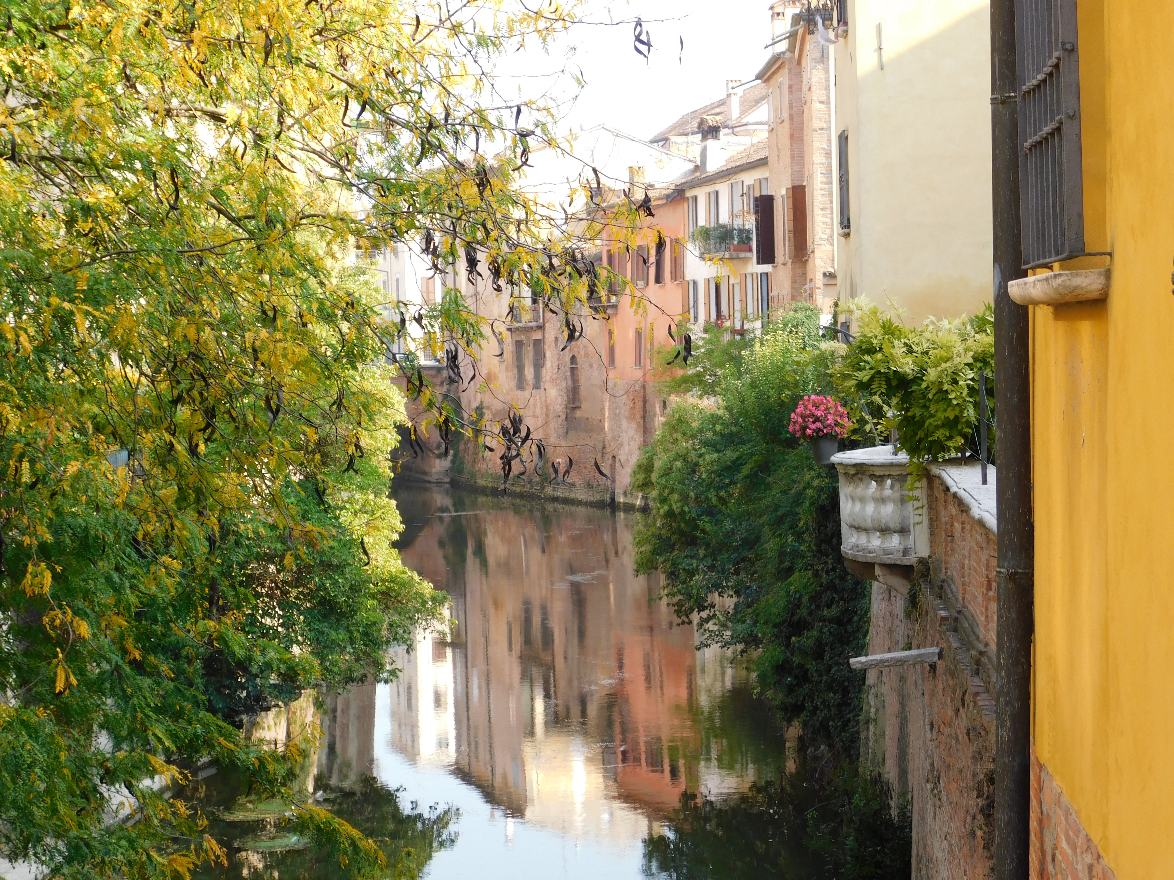 Le Rio